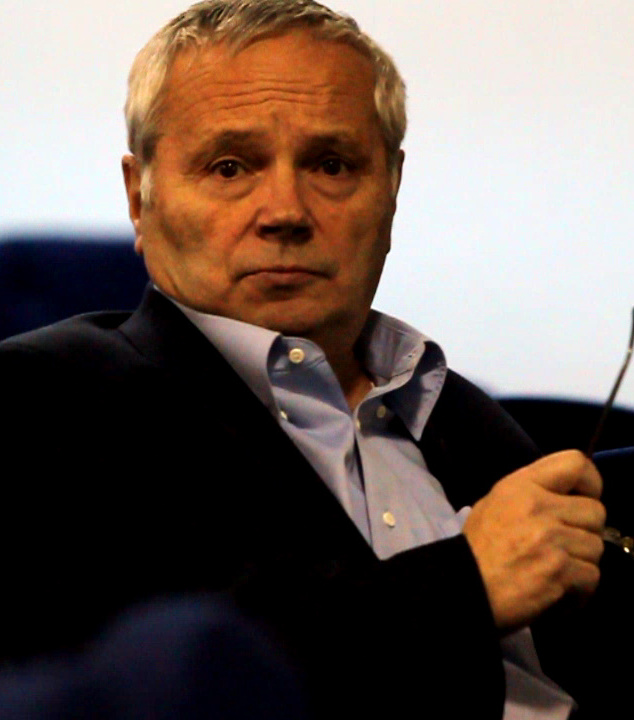 Александр Григорьевич Литвак, российский физик, академик РАН, директор Института прикладной физики РАН